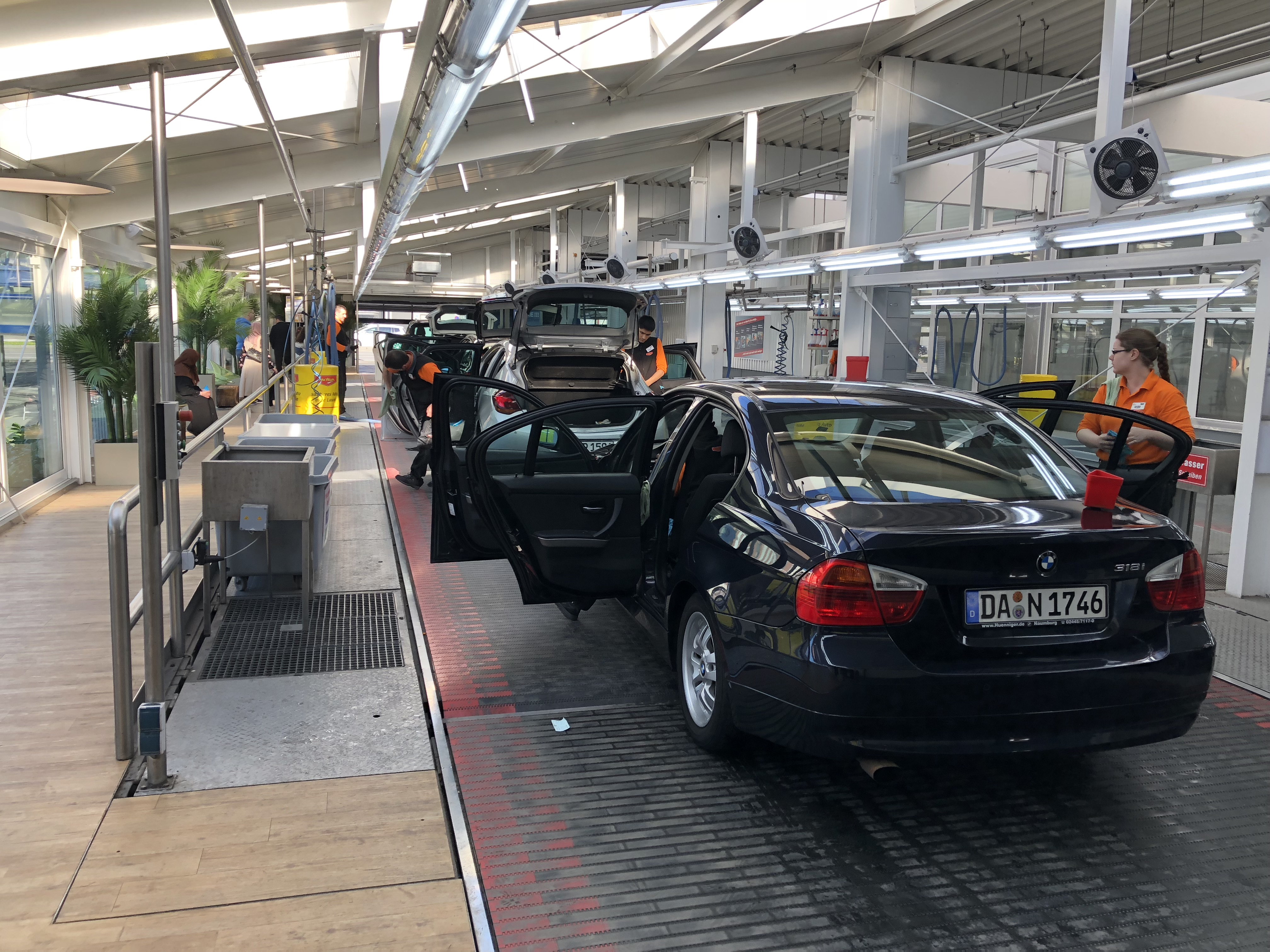 Innenraumreinigung eines KFZ am Fließband